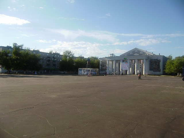 на площади расположены Дворец культуры и памятник В.И. Ленина